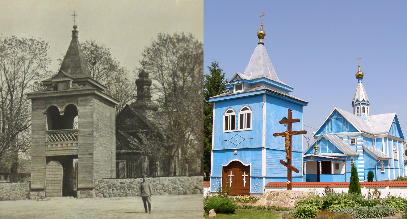 Беларуская (тарашкевіца): Маскалізацыя (русіфікацыя) Вялікага Княства Літоўскага. Мястэчка Чарнаўчыцы Берасьцейскага павету. Пятніцкая царква, помнік архітэктуры барока: аўтэнтычны выгляд (налева) і па частковым руйнаваньні ў выніку маскоўскай перабудовы (направа)